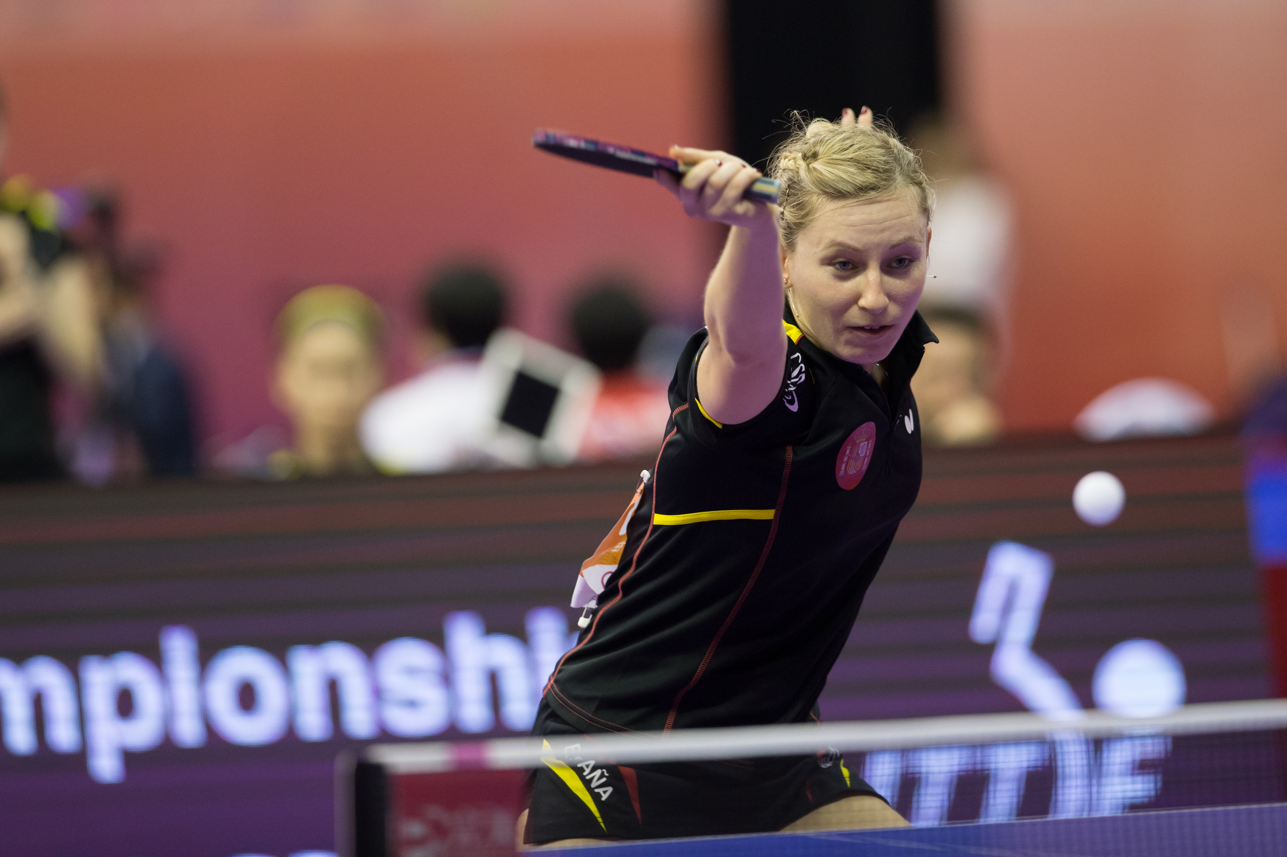 _K0K8617